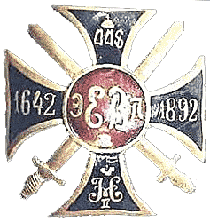 Badge of Erivansky 13-th grenader Regiment